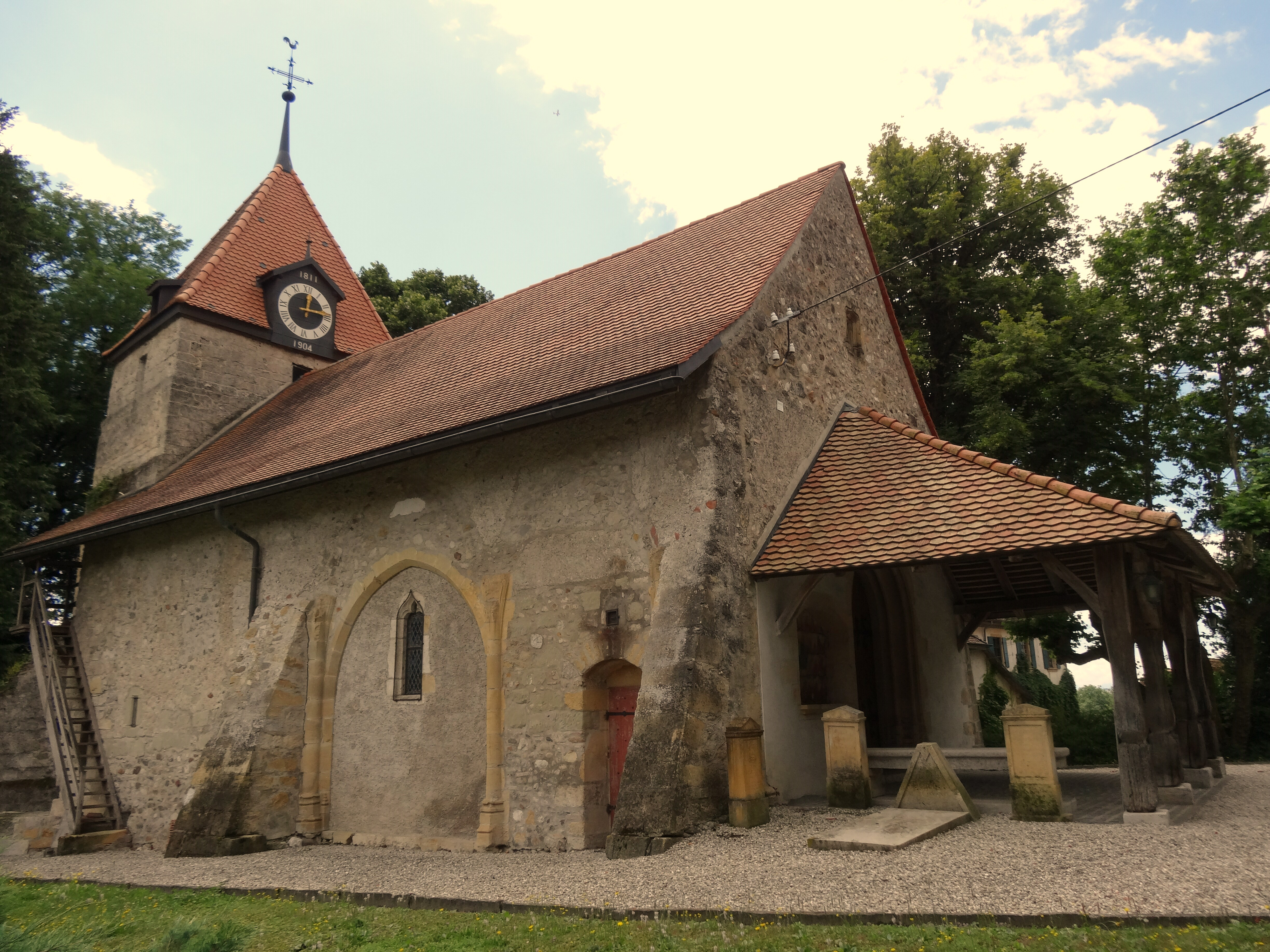 Giez, Le temple